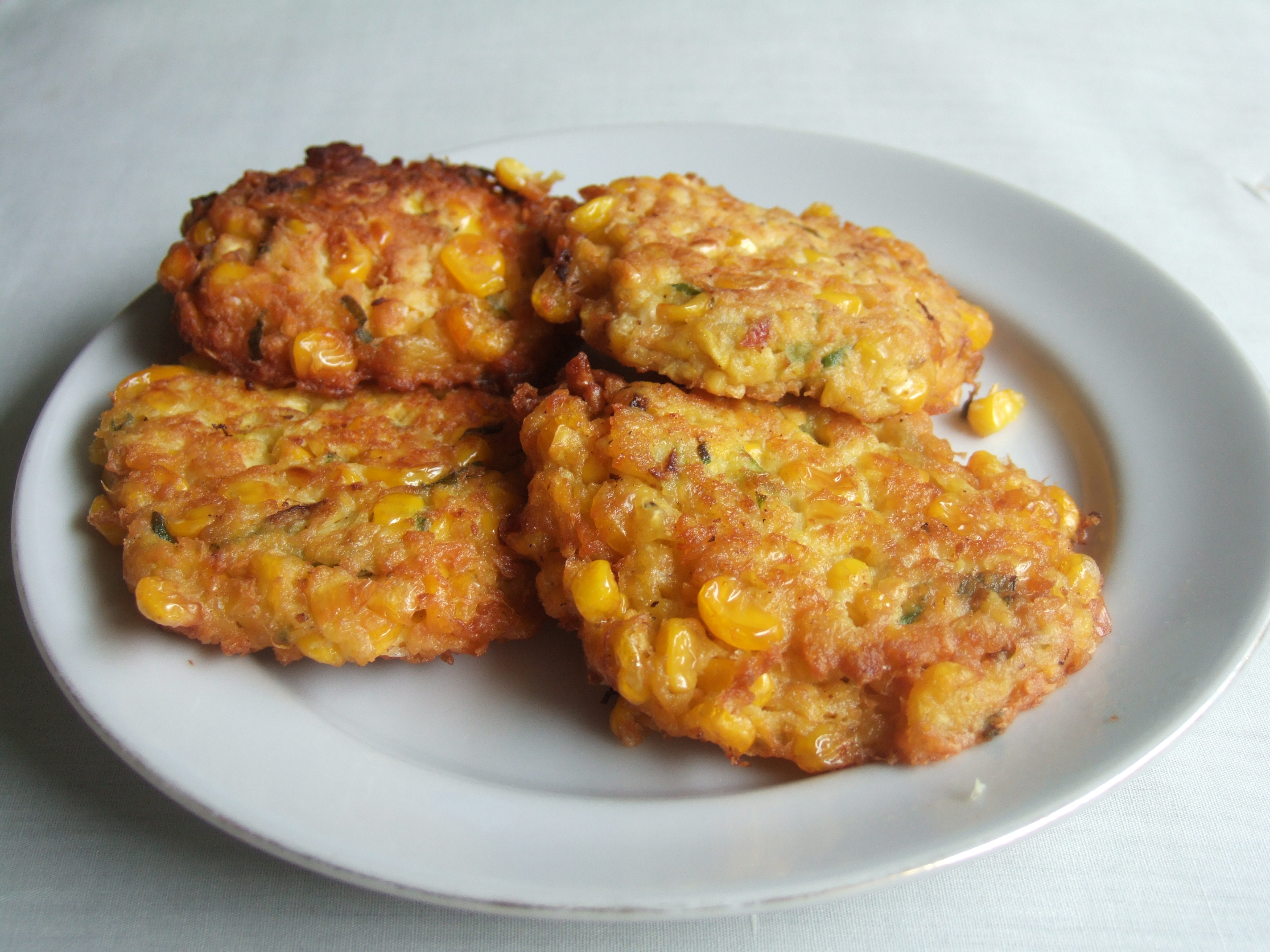 Perkedel jagung